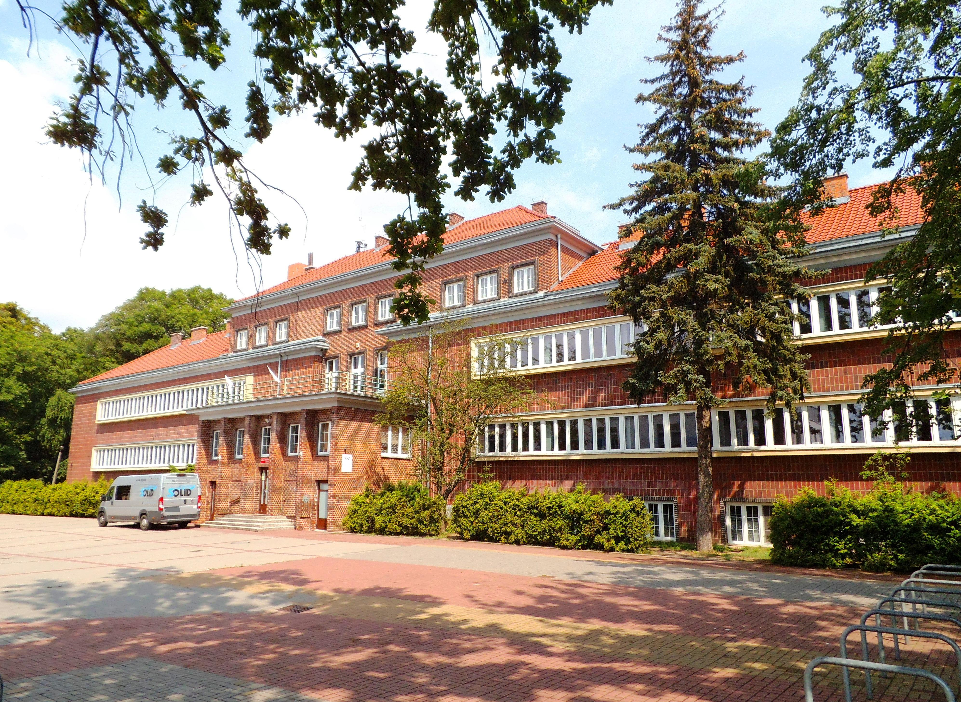 Budynek Szkoły Podstawowej nr 14 w Toruniu